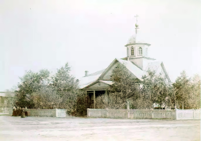 Храм в честь святителя Николая Чудотворца, Тихвинский Богородицкий монастырь, Бузулук